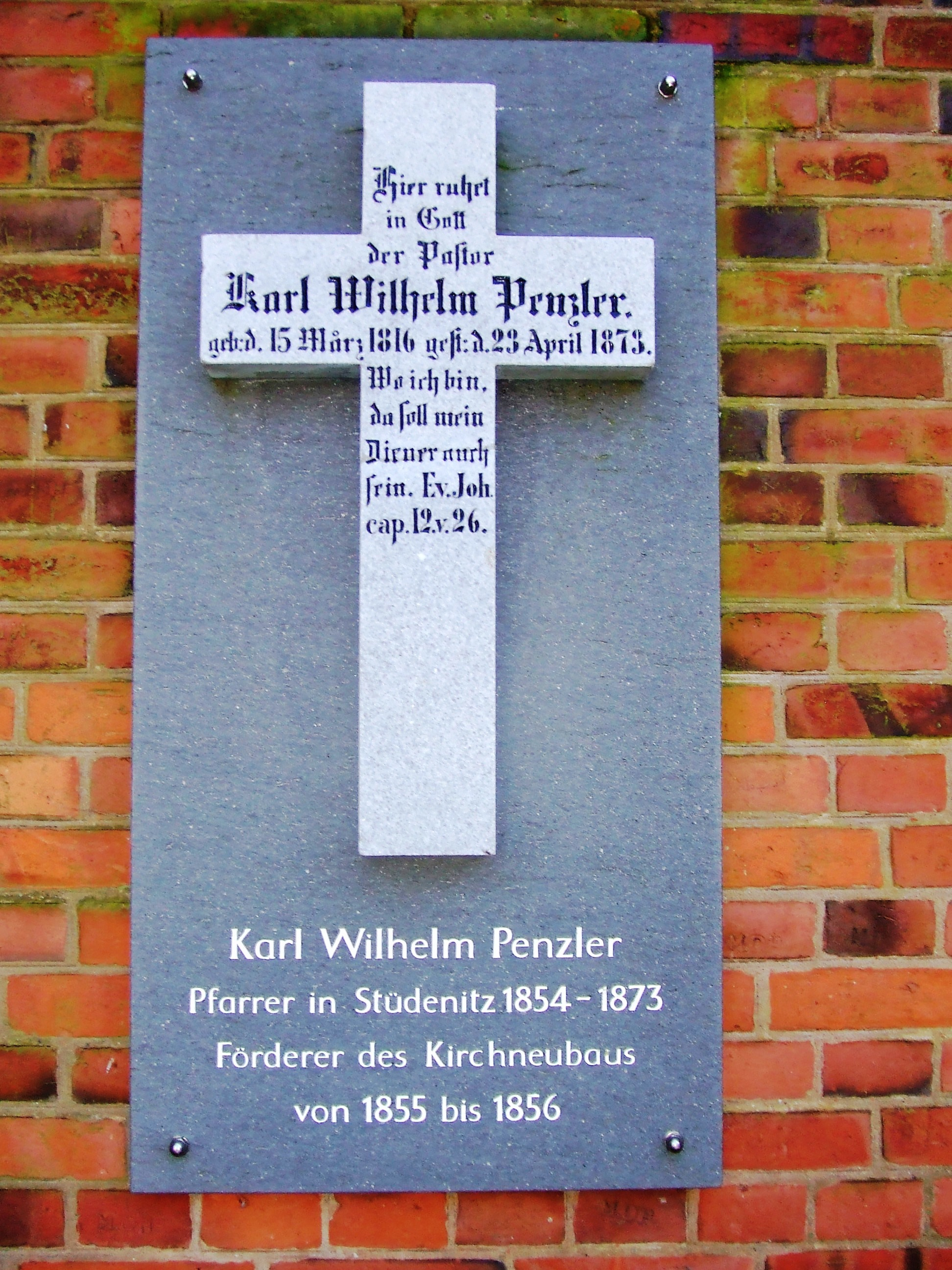 Gedenktafel für Pastor Penzler am Turm der Kirche in Stüdenitz.